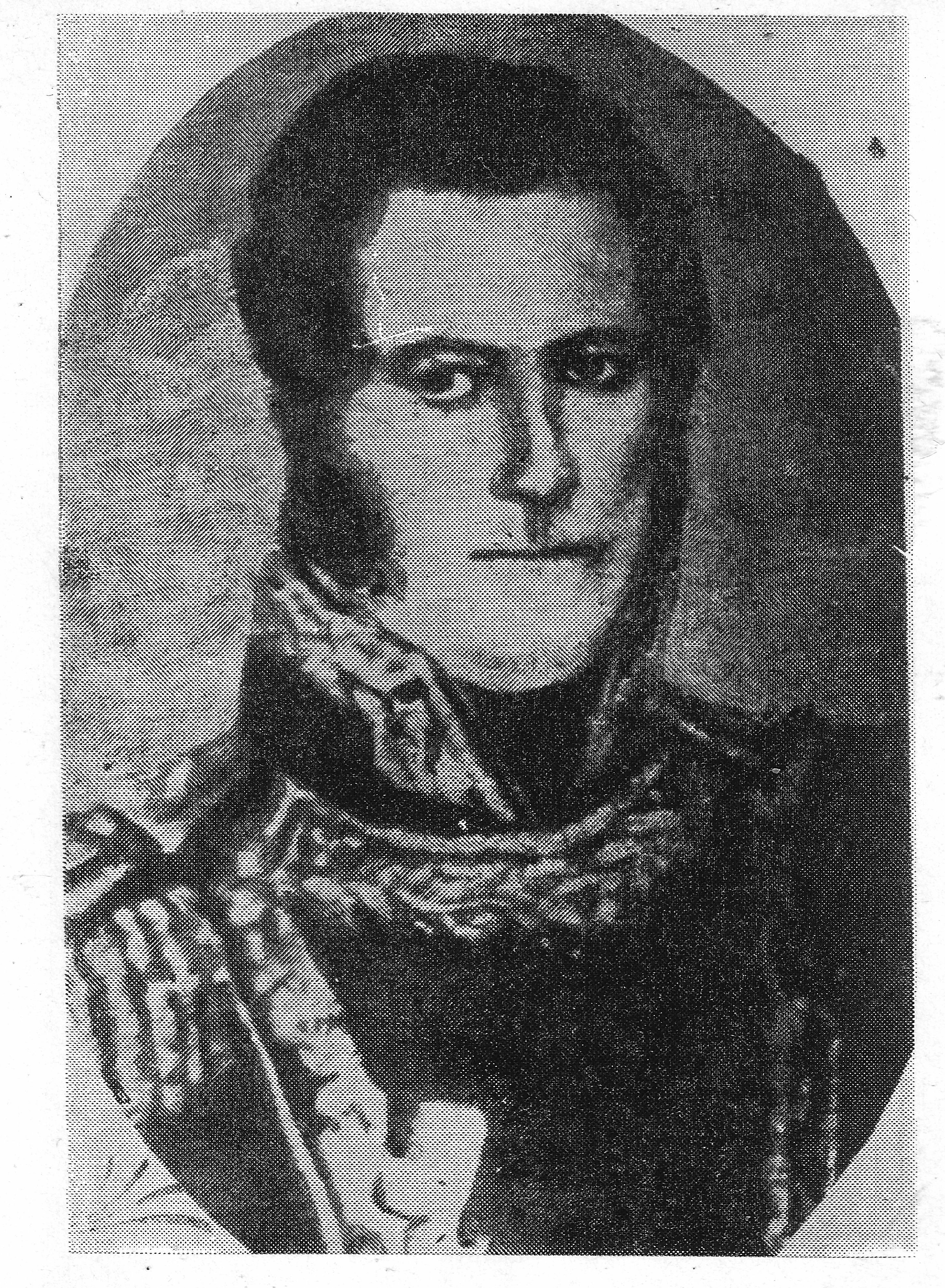 Pablo Alemán, coronel del Ejército Argentino y ex gobernador de la provincia de Jujuy